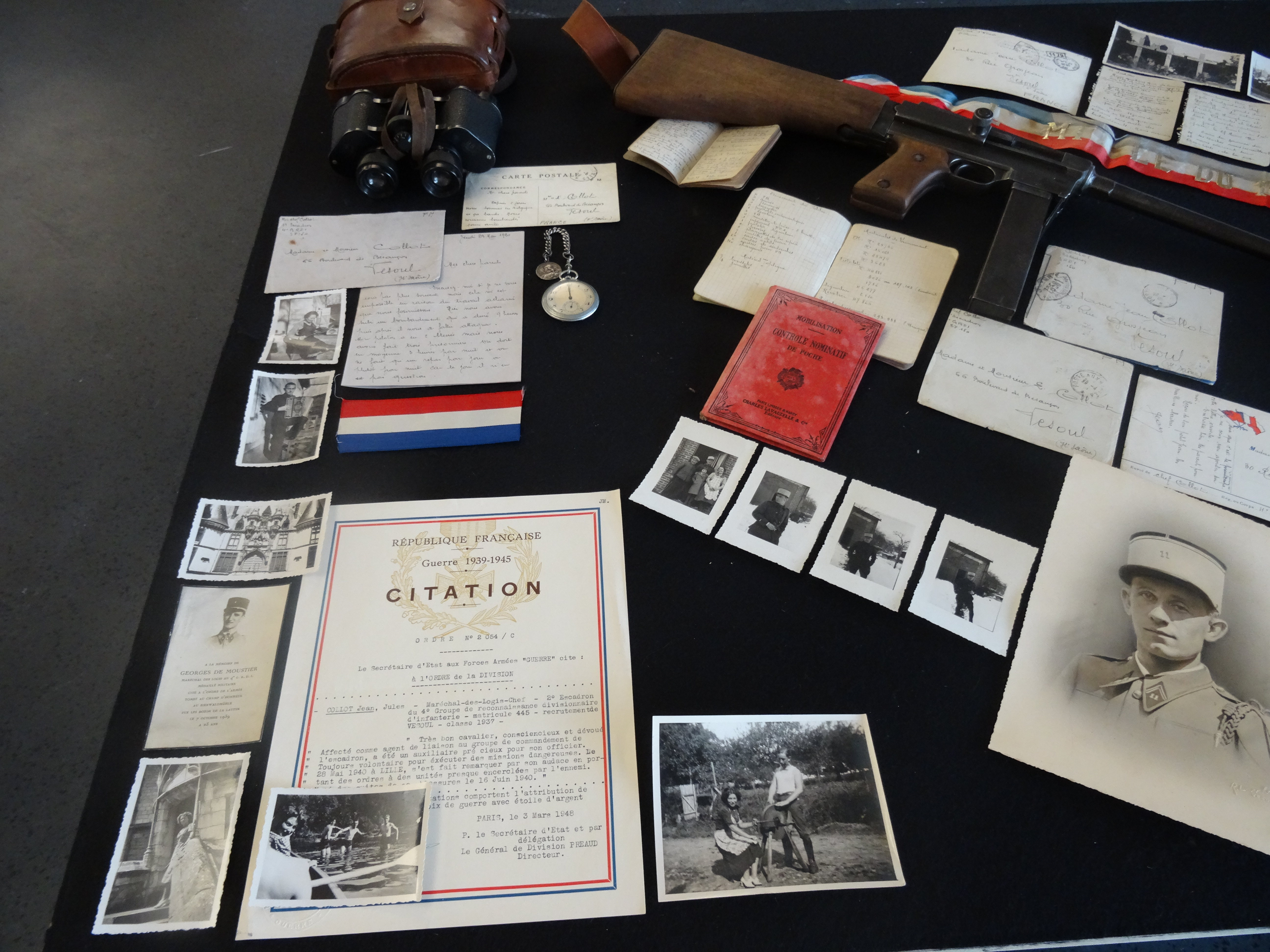 Une des vitrines de l'exposition "Jean Collot 1917-1940 une existence vésulienne " aux Archives Départementales de la Haute-Saône (6 décembre 2017 - 6 avril 2018)